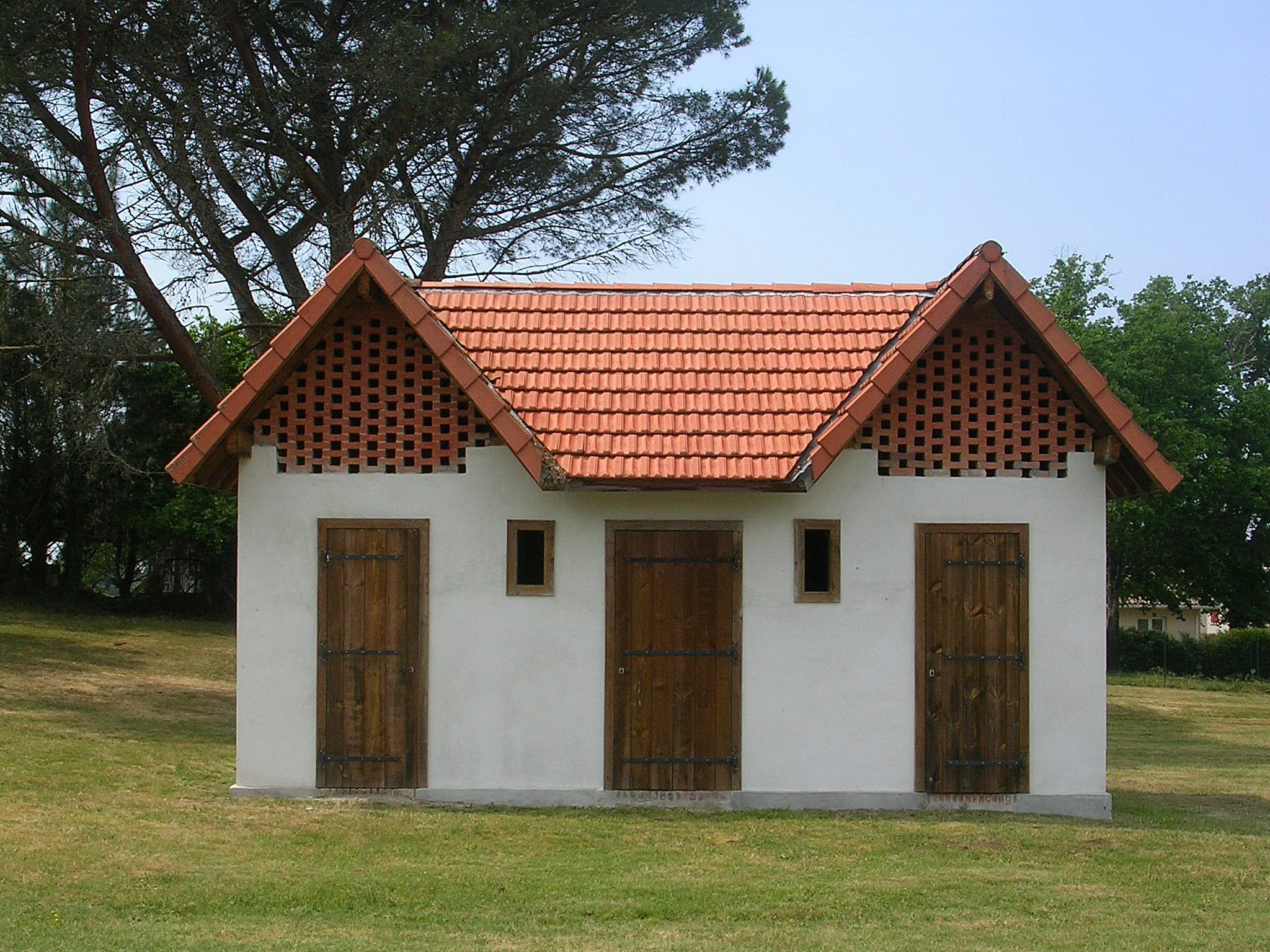 Ancien four à pain et pigeonnier du XIXe siècle à Bias, dans le département français des Landes